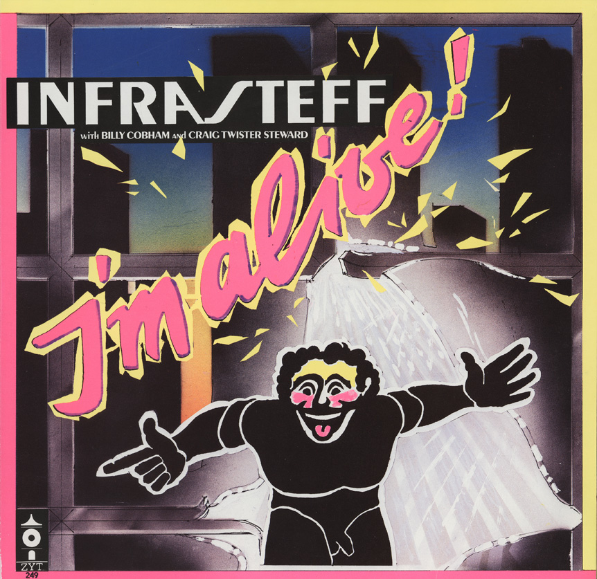 Die Rockoper I'm Alive (Text und Libretto: Signer/Müller) wird 1984 in St. Gallen uraufgeführt. Die Grafik des Plattencovers stammt von István Deér.